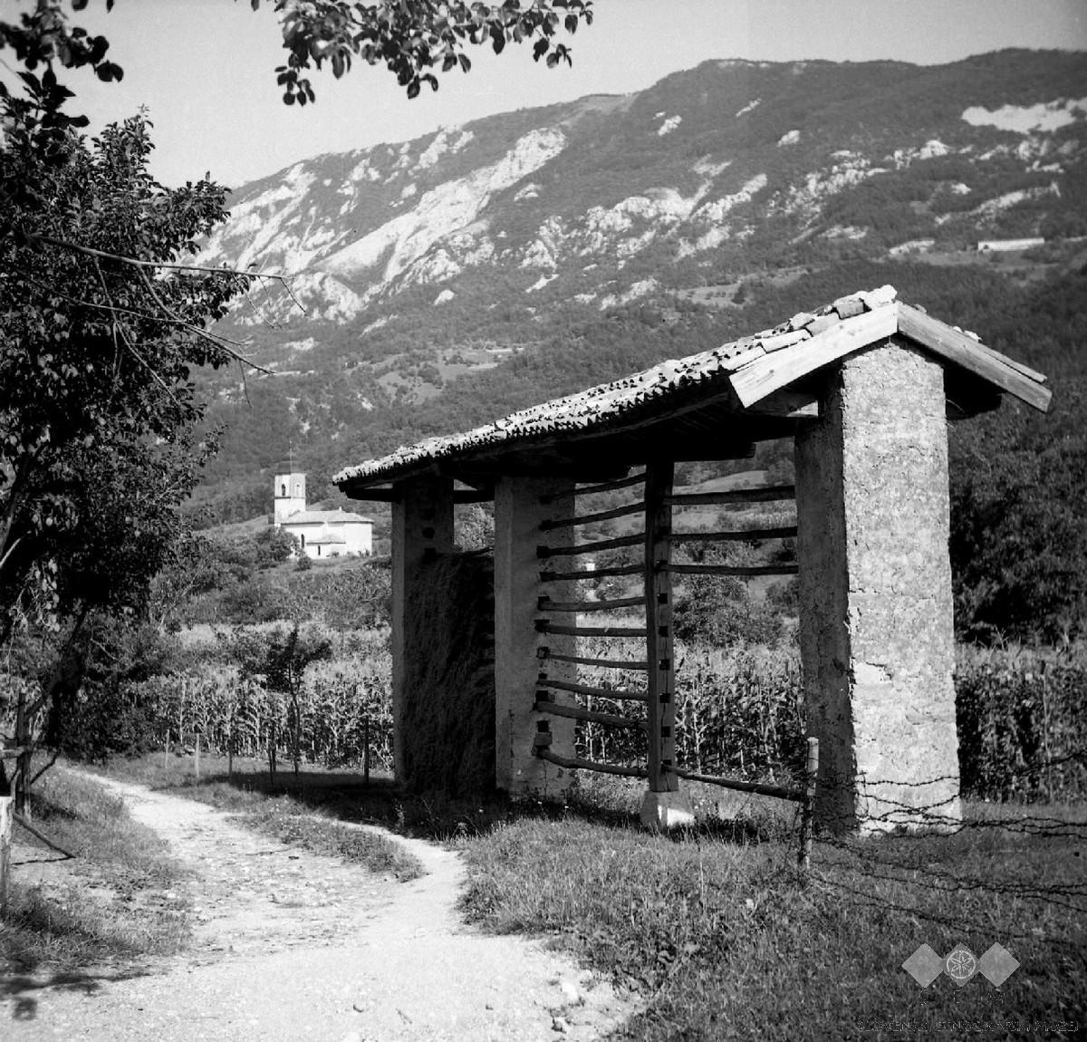 Kozouc, v ozadju cerkev Sv. Danijela, Sanabor.